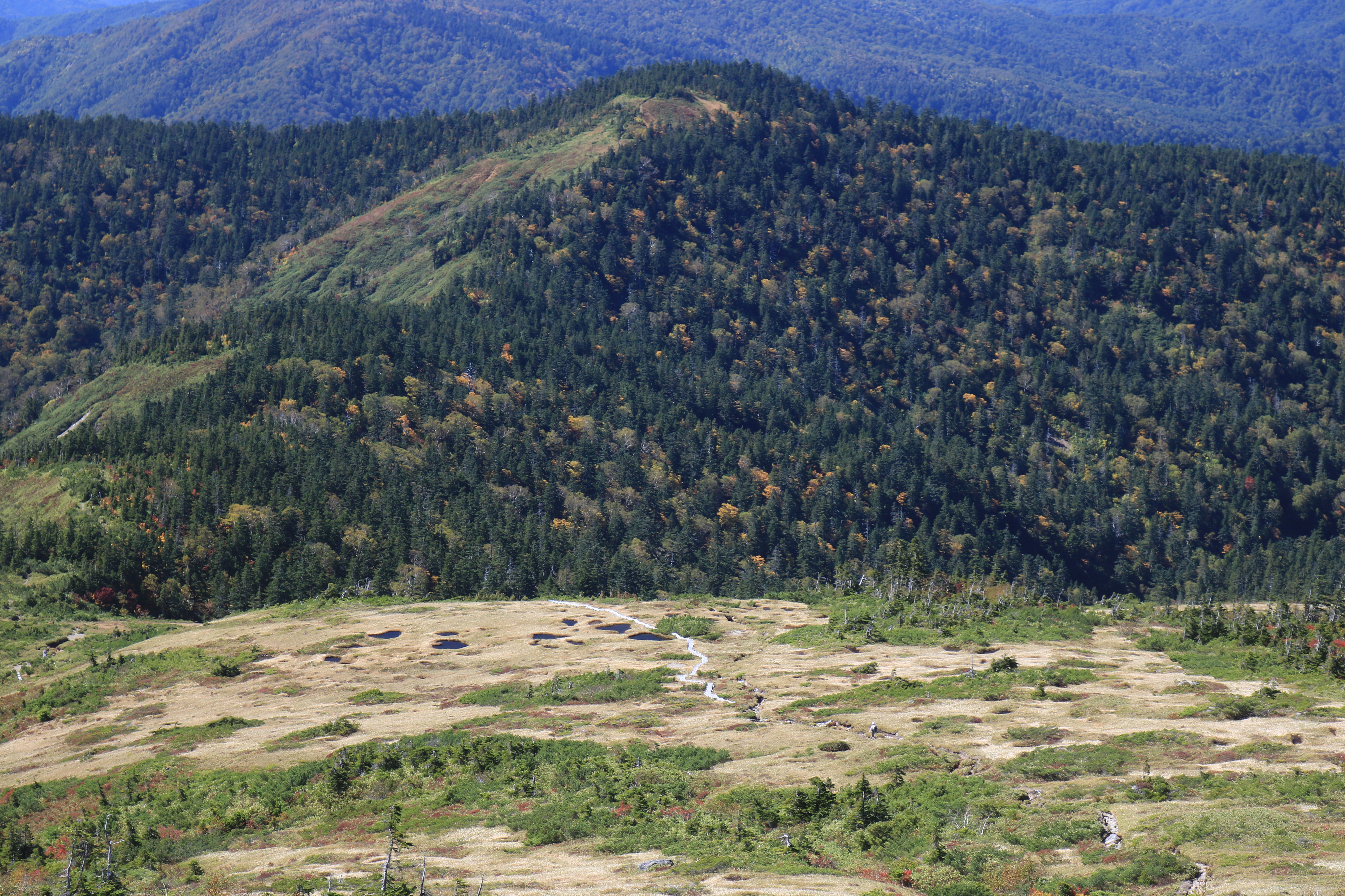 飛騨山脈立山連峰の北ノ俣岳から望む寺地山、左手前に木道と池塘群